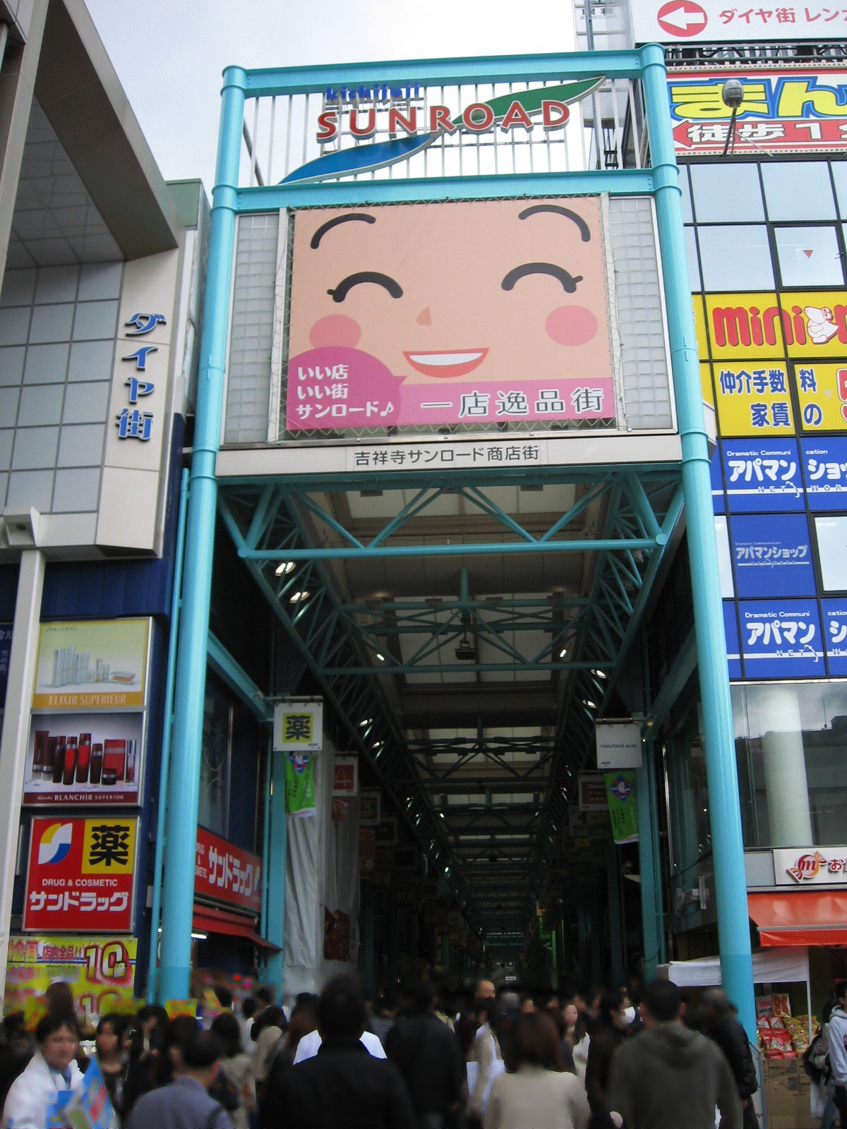 東京・吉祥寺の「サンロード商店街」。1971年開業。現在のアーケードは3代目で、2005年に完成した。吉祥寺駅側。2010年末にアーケード内の柱の色がパステルカラーに変更された。